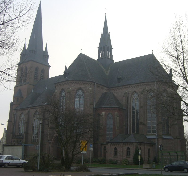 St. Vitus, die Kirche des kleinen Ortes Oedt, NRW